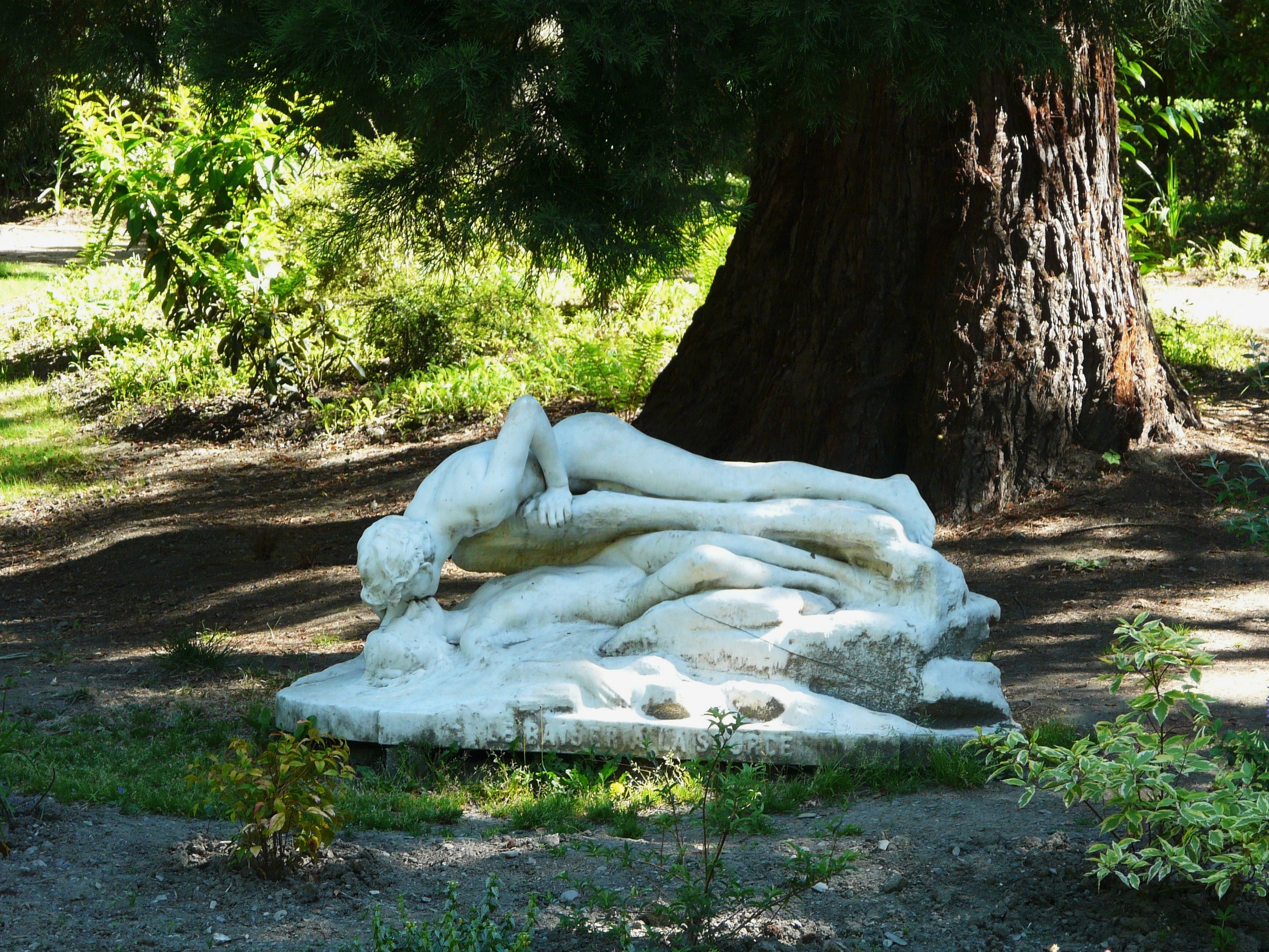 Statue du Baiser à la Source, œuvre d'Henri Coutheillas, parc du casino de Bagnères-de-Luchon, Haute-Garonne, France.